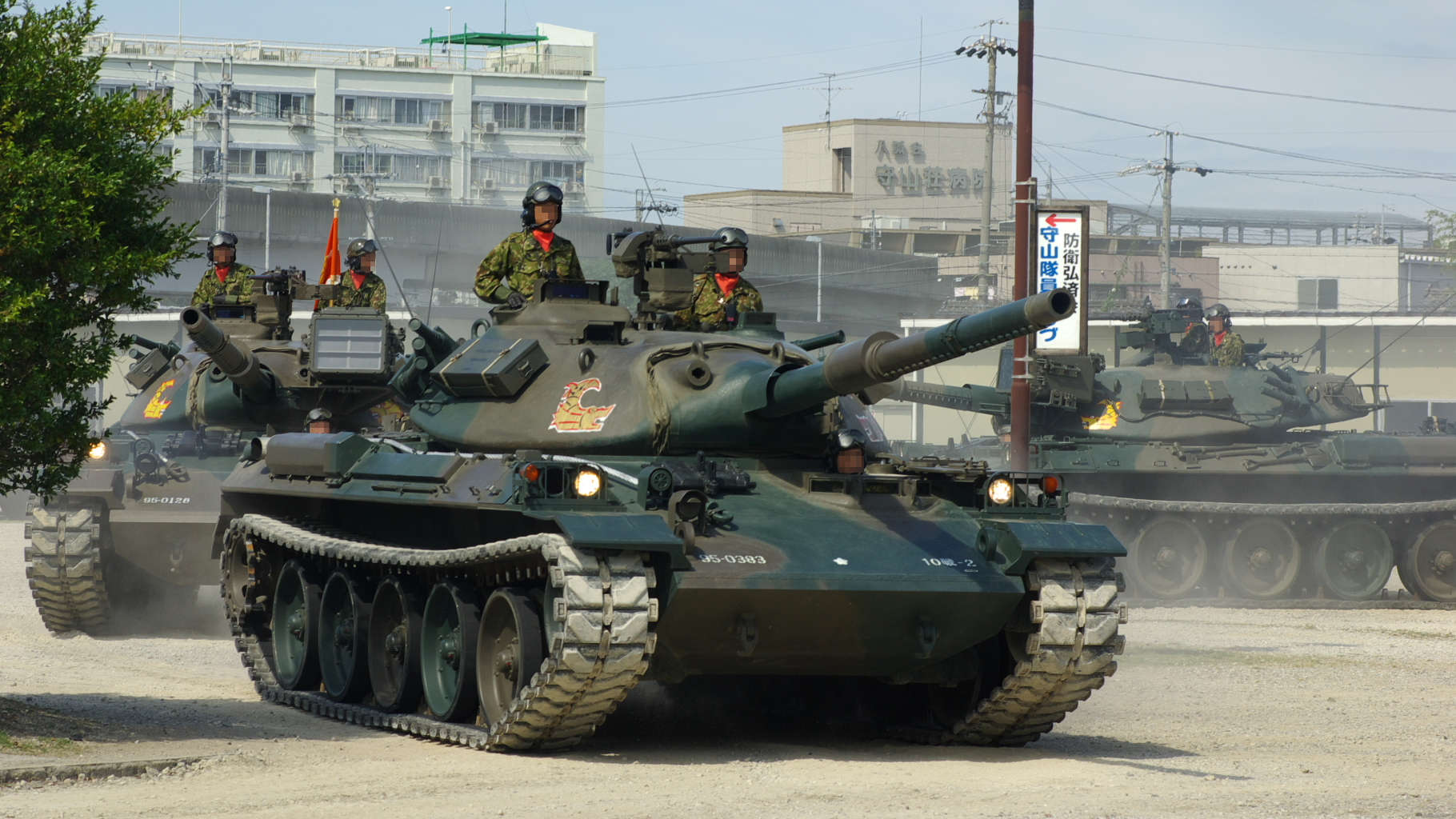 自衛隊第10師団所属の74式戦車。PENTAX K10D + smc PENTAX-A☆ 1:1.4 85mm、16:9にトリミング